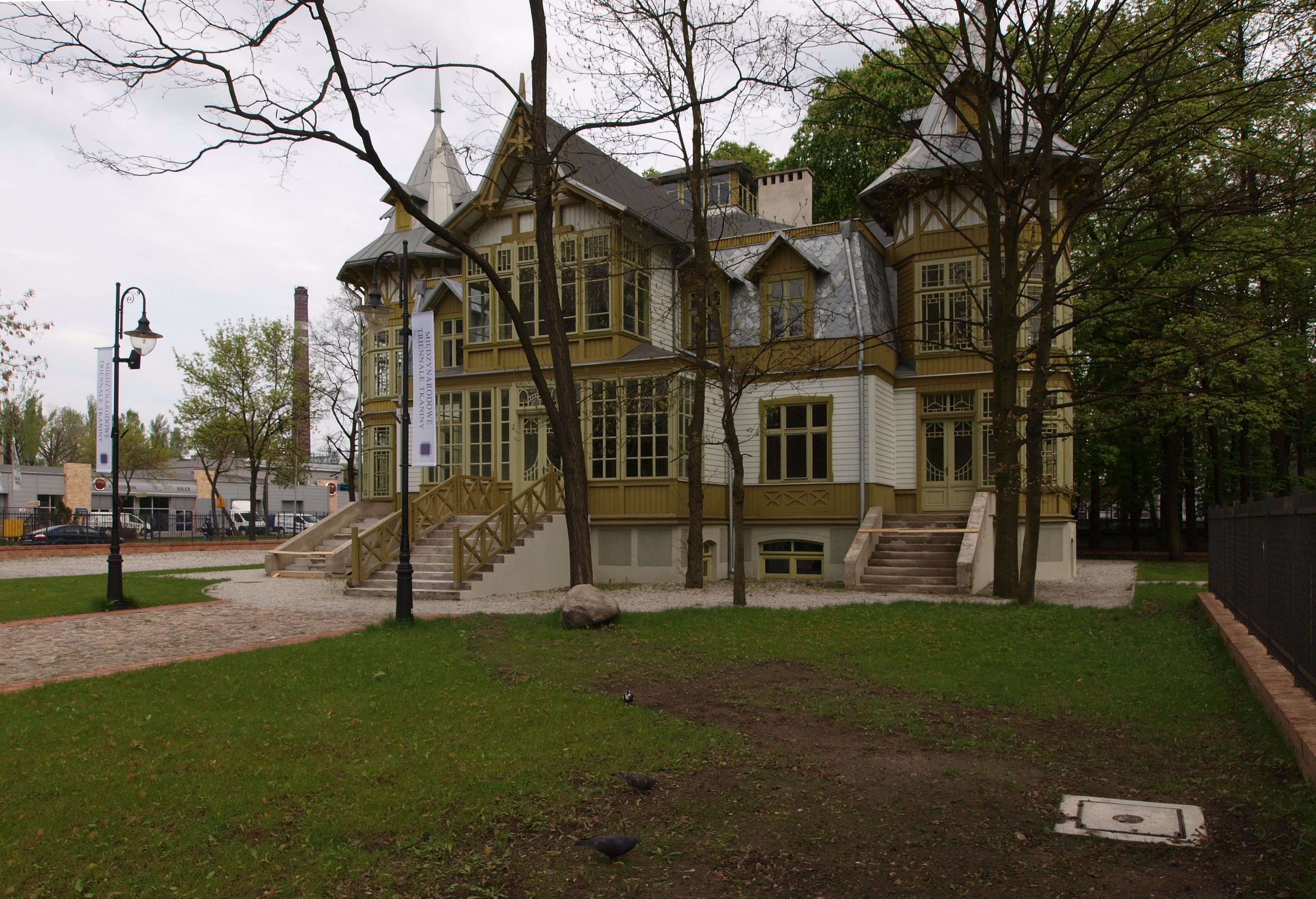 Skansen Łódzkiej Architektury Drewnianej. Willa letniskowa, przeniesiona z Rudy Pabianickiej, z ul. Scaleniowej 18.